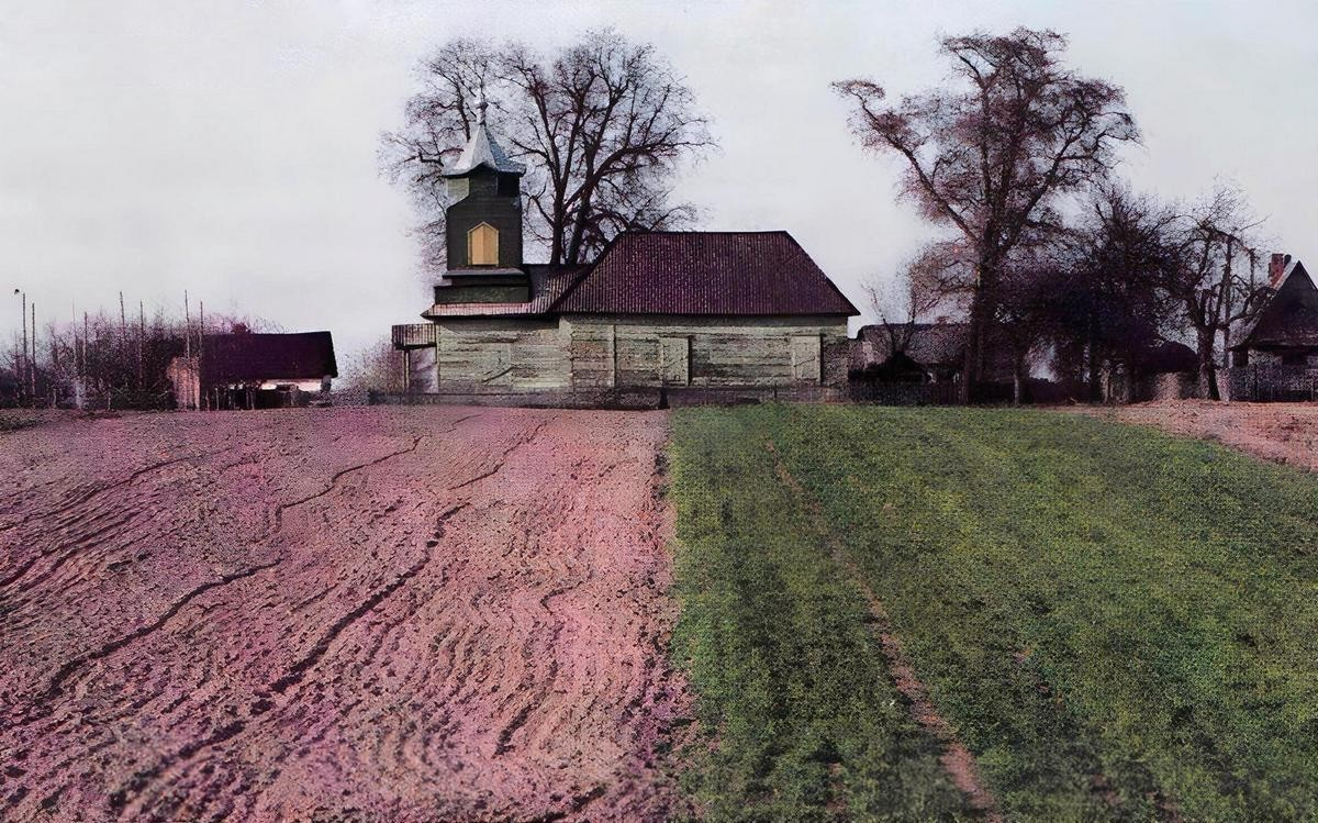 Церковь в деревне Турковская Слобода, начало ХХ века